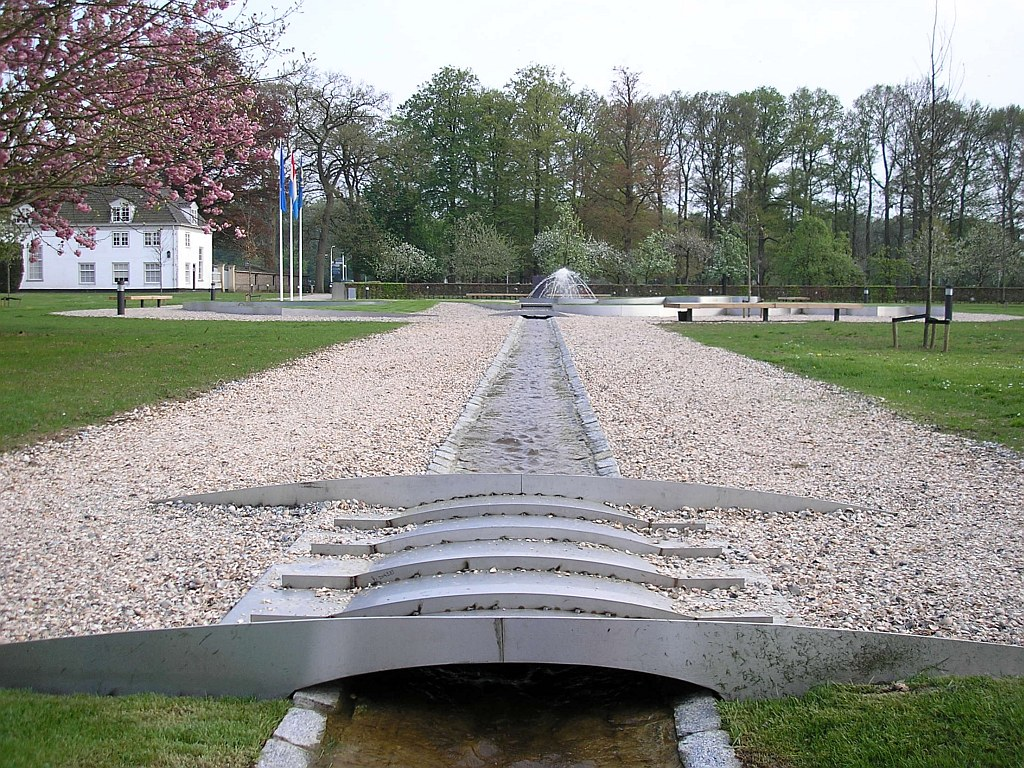 Tuin van Bezinning; Aanzicht over waterloop vanaf fontein naar sloot aan achterzijde. Nationaal monument ter ere van tijdens de uitoefening van de dienst overleden Nederlandse politiemensen. Locatie: Achter koetshuis van Huis 't Velde te Warnsveld (NL)